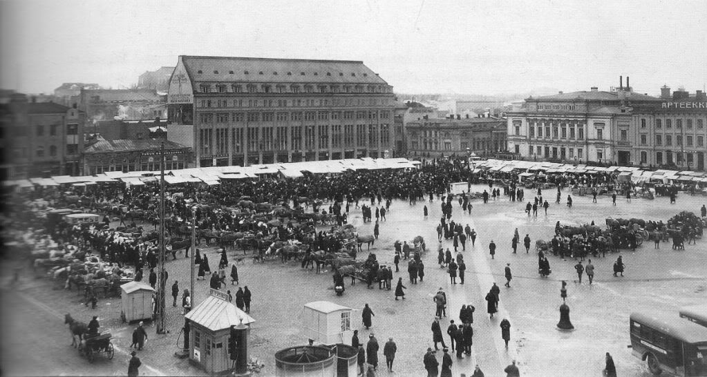 Торговая площадь Турку (Финляндия)